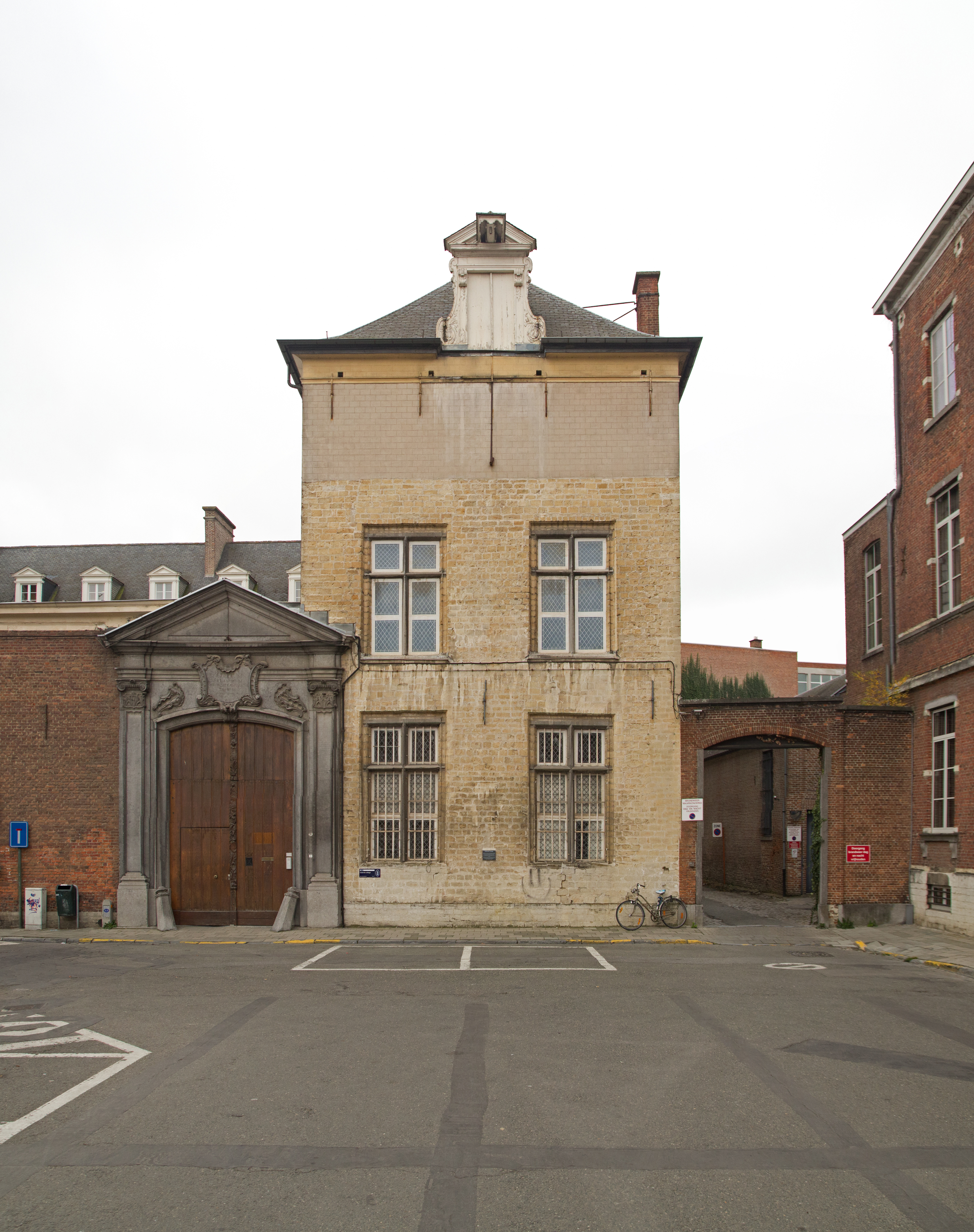 Paridaens instituut (hollands College), Leuven